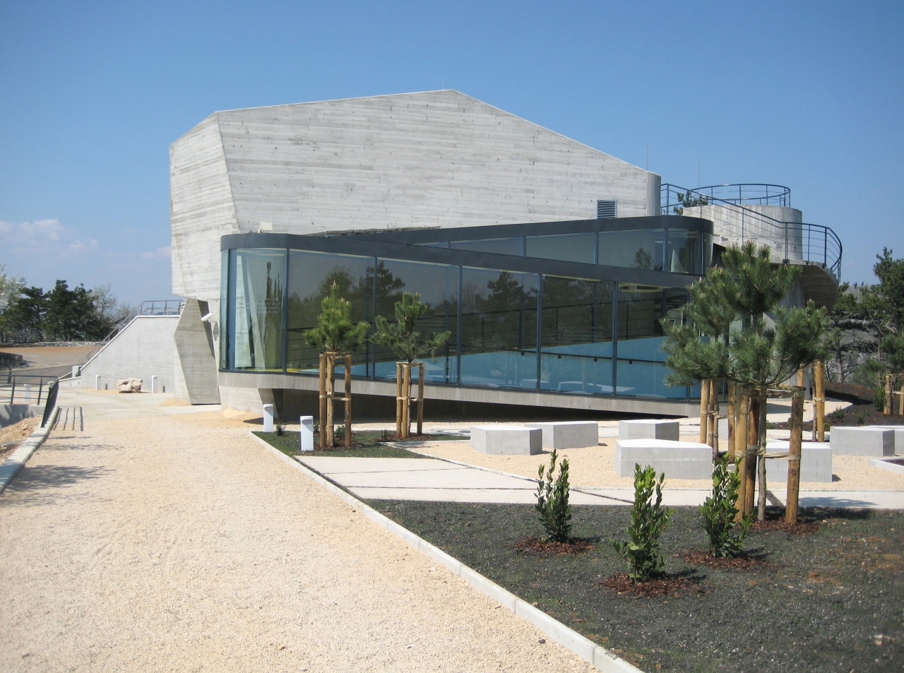 Astronomski centar u Rijeci na brdu Sveti Križ. Dana 18. svibnja 2001. godine članovi Akademskog astronomskog društva Rijeka, astronomi amateri i građani, dobili su Riječku zvjezdarnicu.